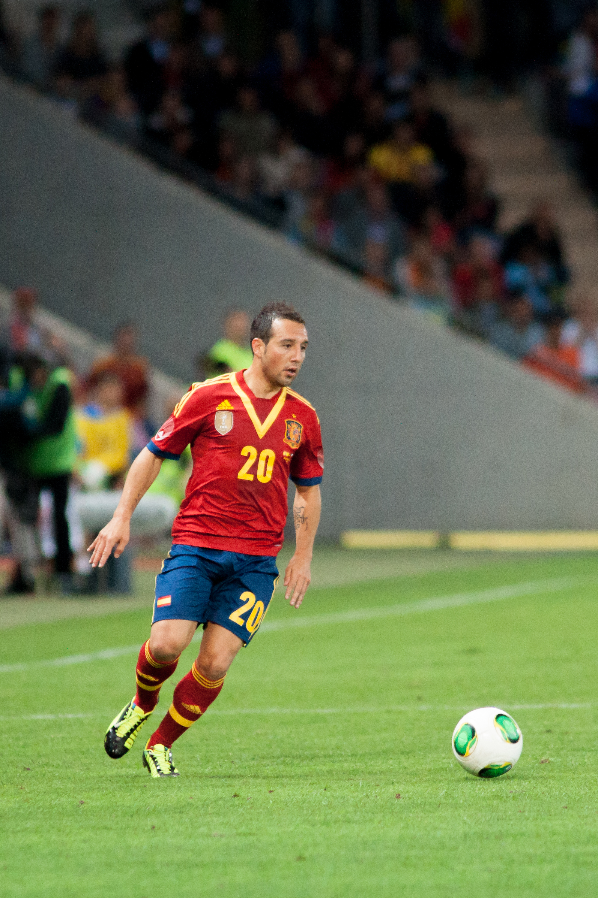 Espagne - Chili, 10 septembre 2013.